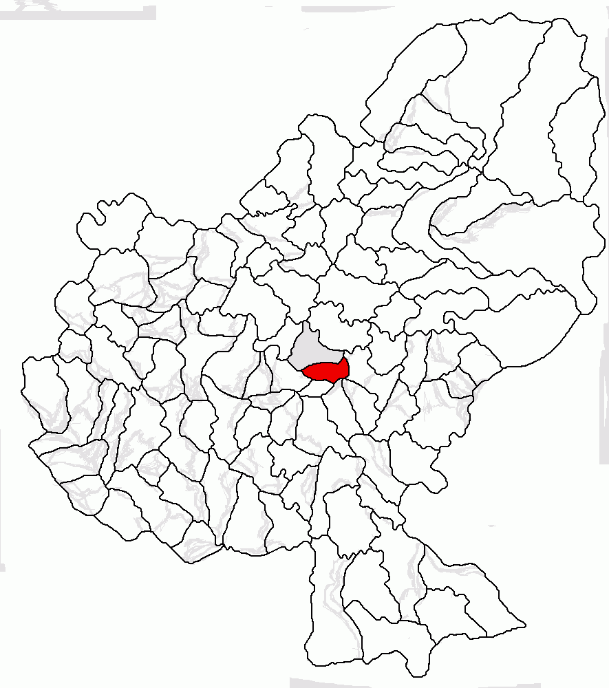 Categorie:Hărţi ale judeţului Mureş